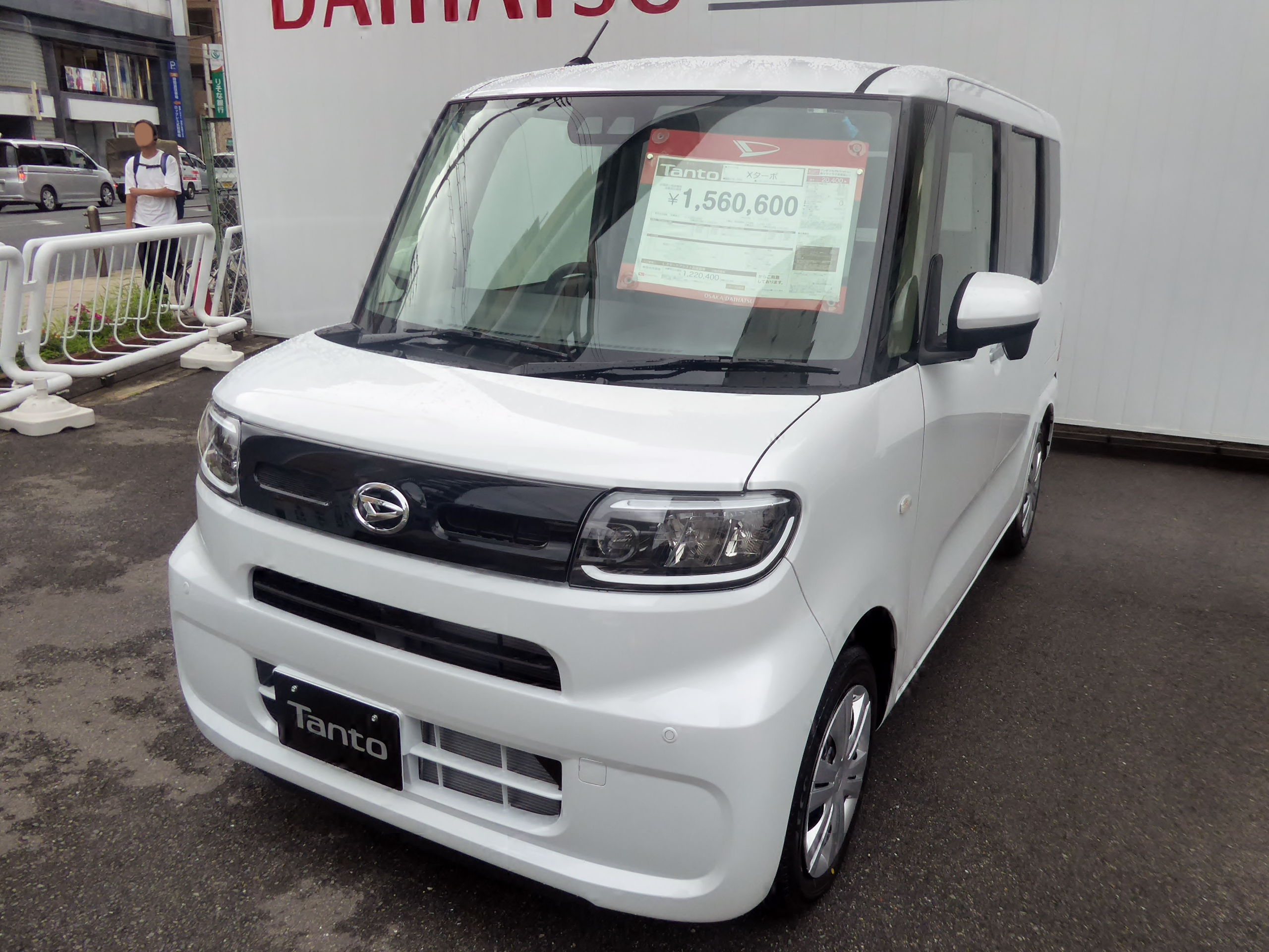 5BA-LA650S-GBGZ型ダイハツ・タントXターボ2WDをフロントから撮影。